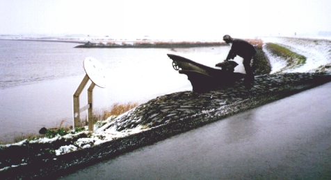 monument Klein Hitland Eigen foto Vijverln